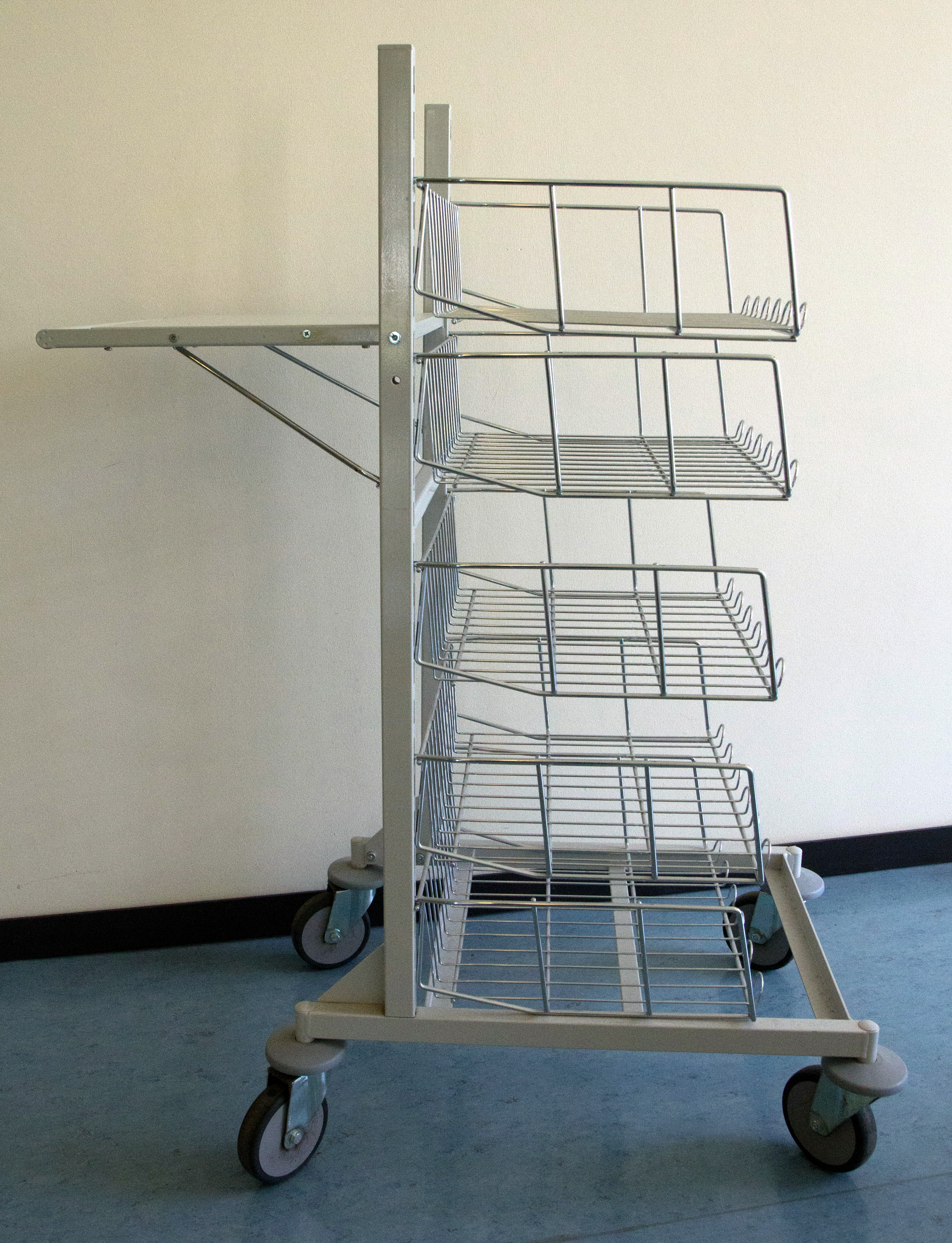 Aktenwagen, gesehen im Sozialministerium Mecklenburg-Vorpommern in Schwerin